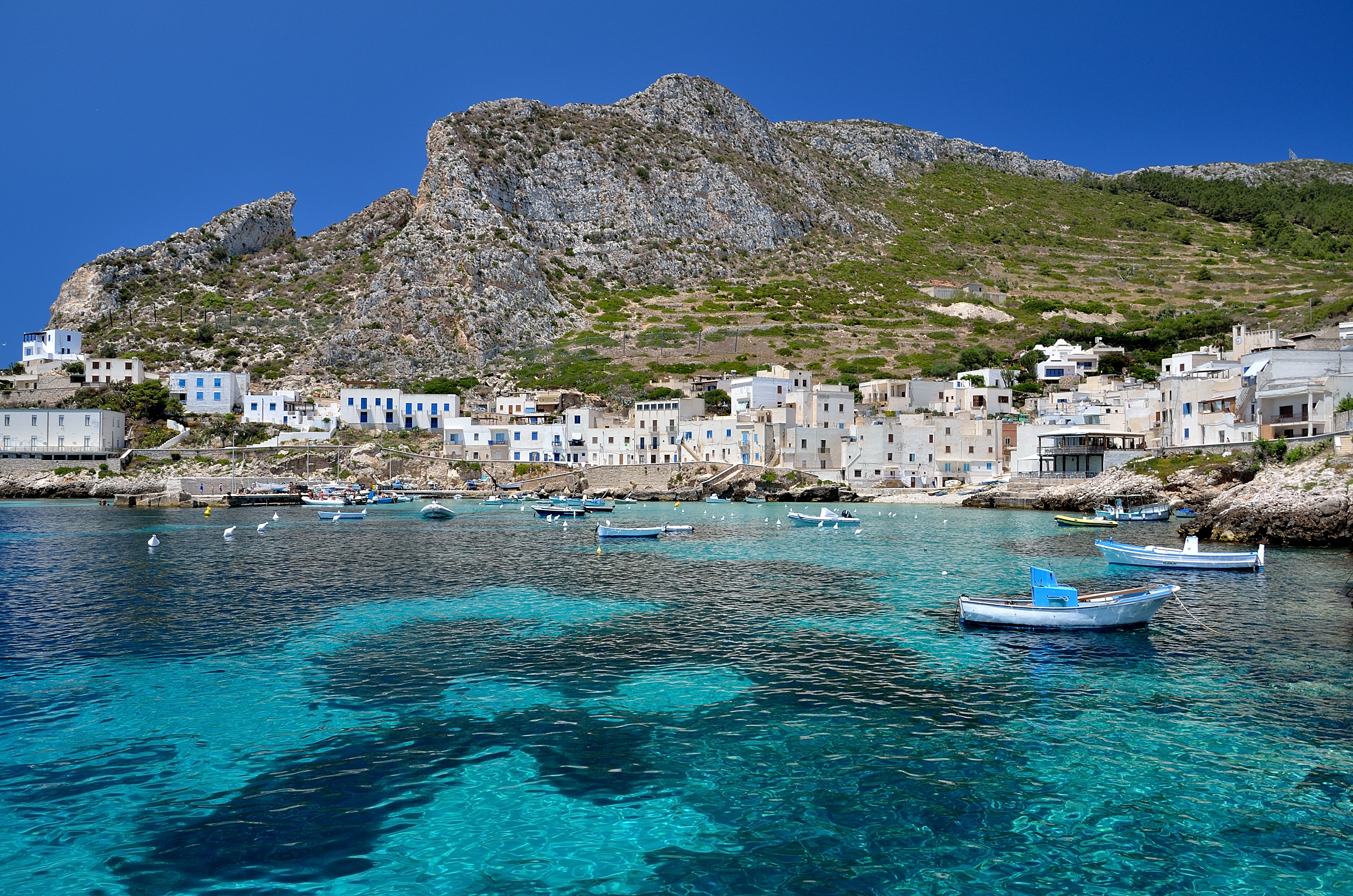 con la punta...